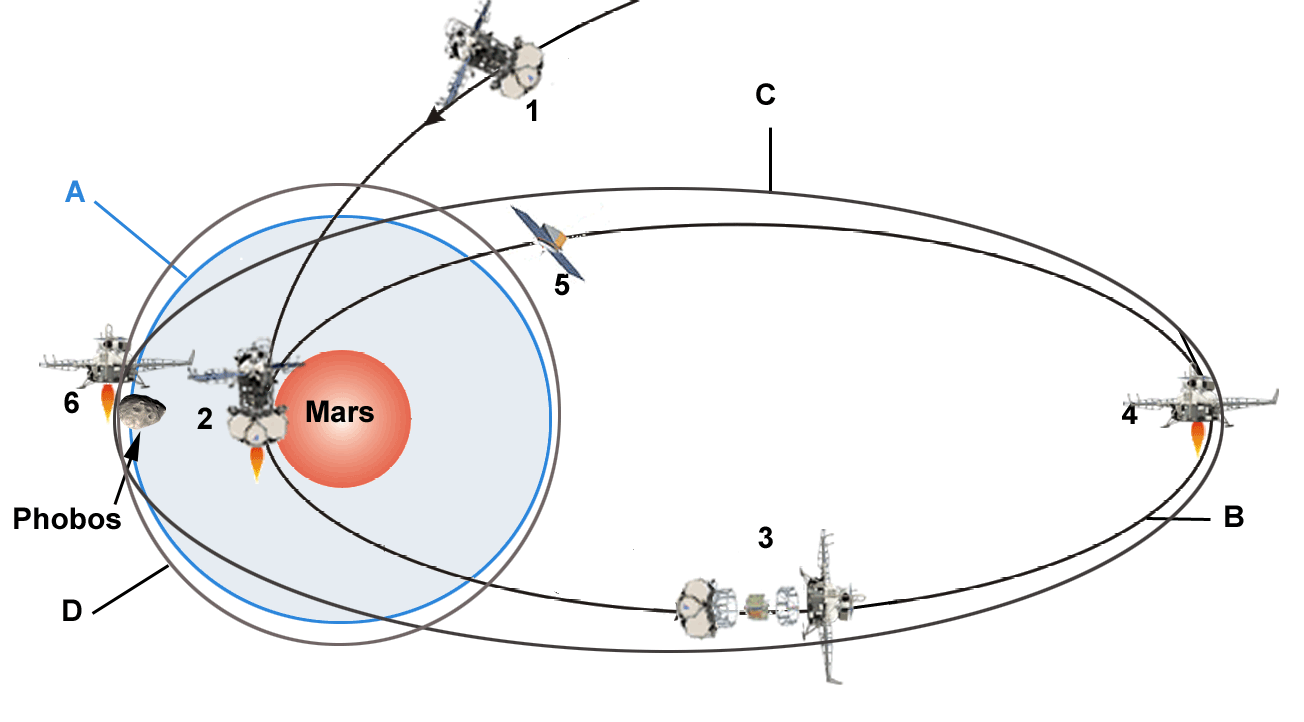 Manoeuvres de Phobos Grunt autour de Mars